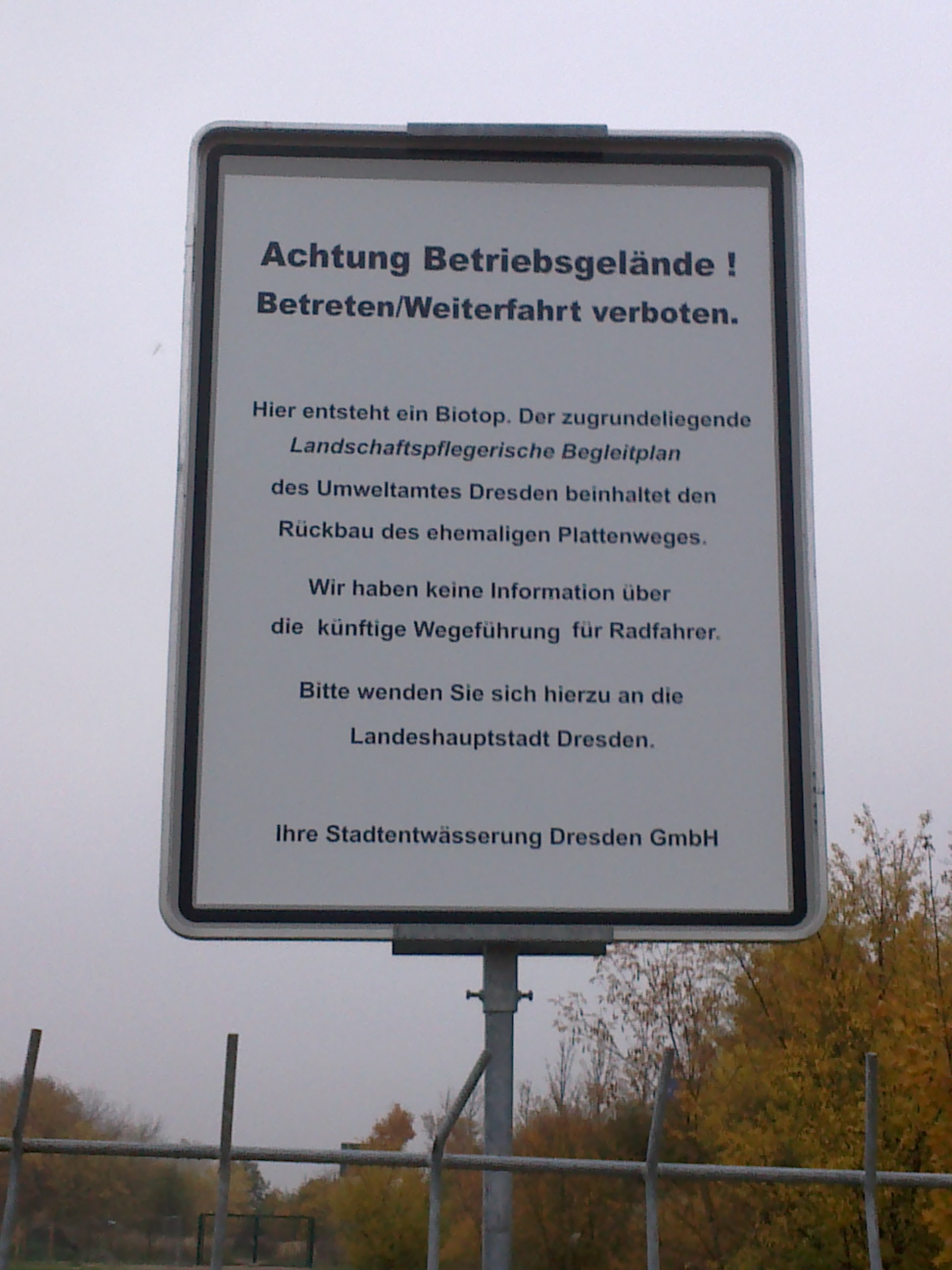 Kläranlage Kaditz. Erklärung zur Radwegsperrung